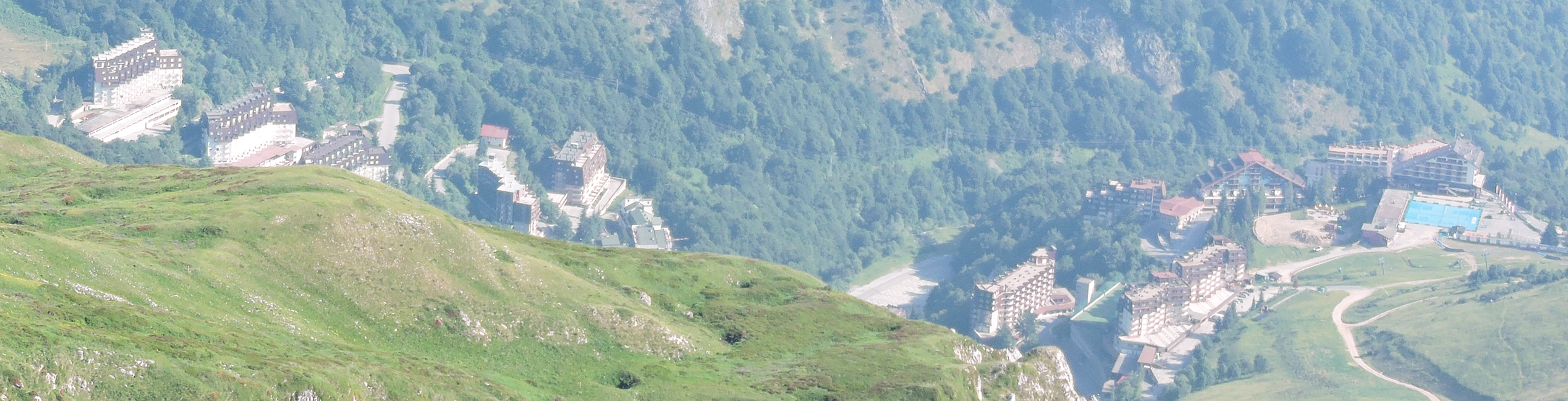 Artesina vista dal monte Mondolè